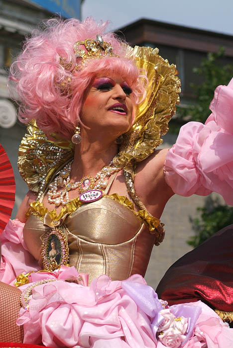 Olivia Jones auf dem CSD Hamburg 2007 in Hamburg